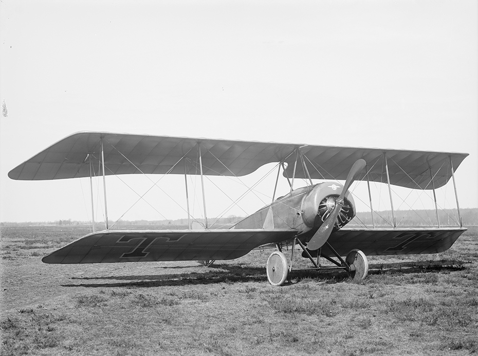 Flygplan Thulin E uppställt i Ljungbyhed.